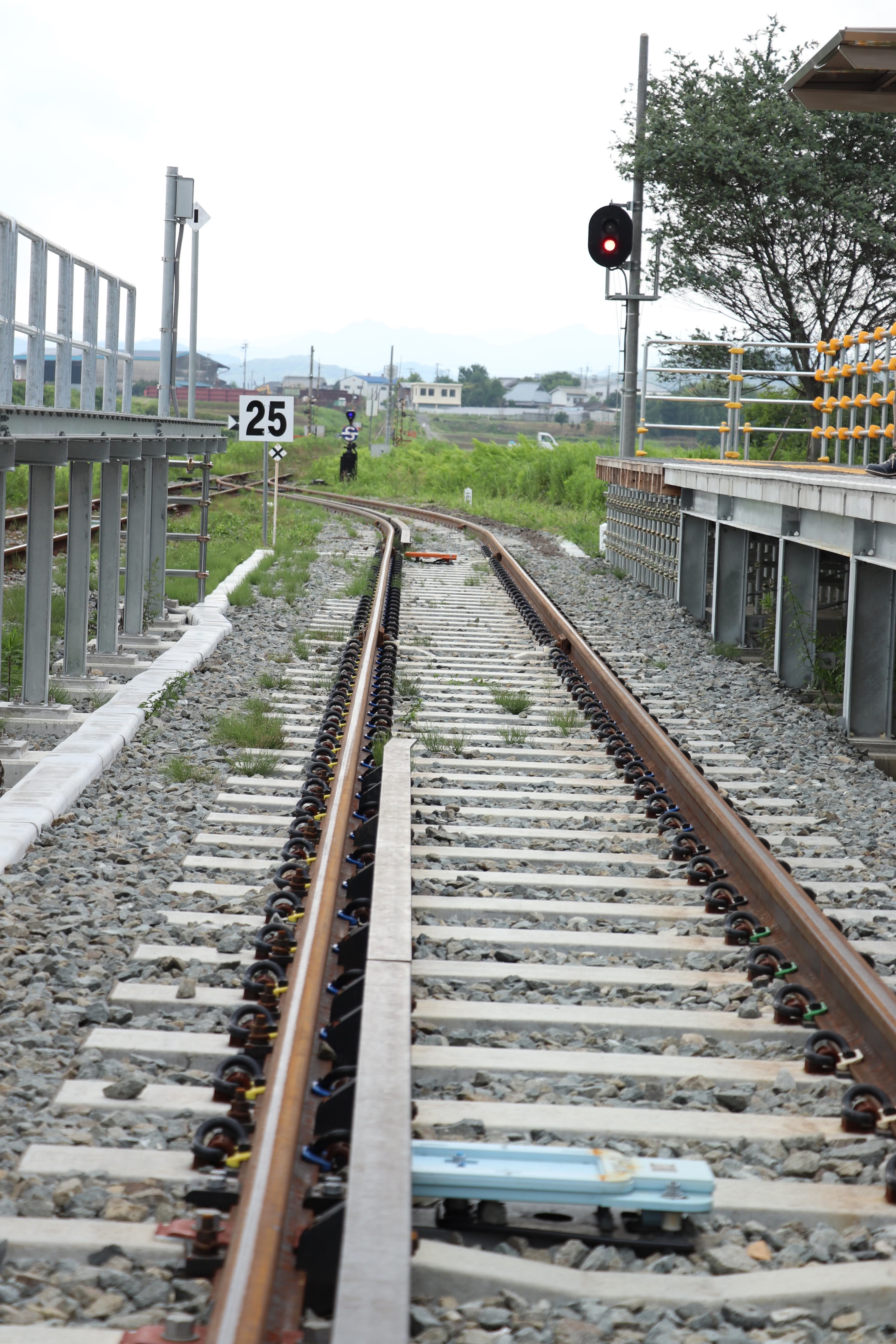 法華口駅２番ホーム、構内踏切より撮影。